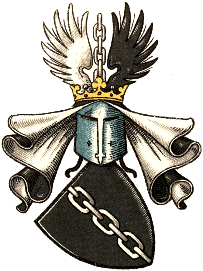 Wappen derer von Schlippenbach